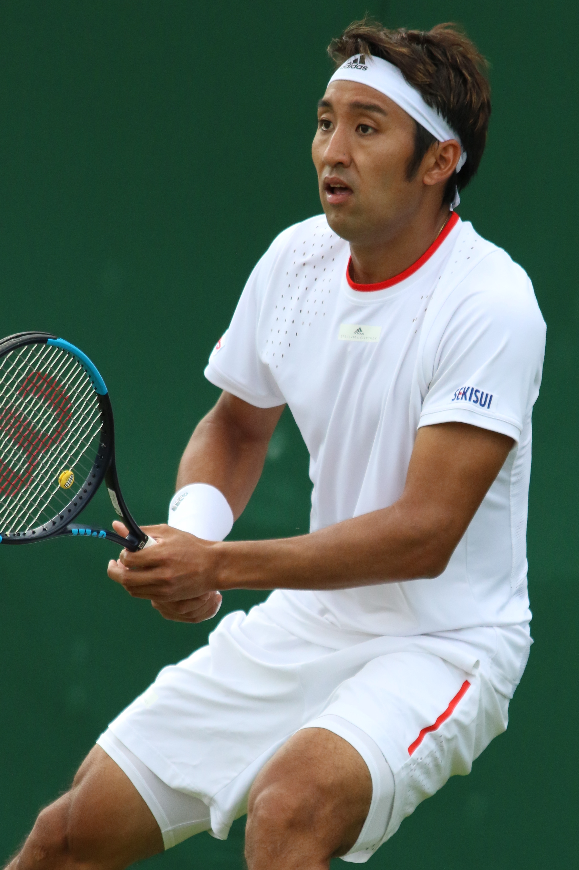 Uchiyama WM19 (24)